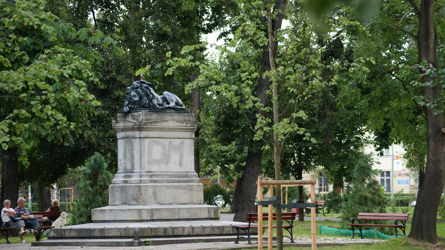 Legnica - Pomnik Lwa (zwany również pomnikiem "śpiącego"